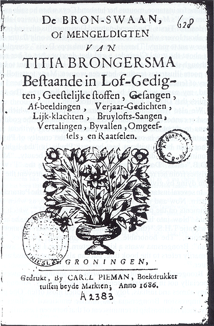 Titelblad van De Bron-Swaan van Titia Brongersma (1686)